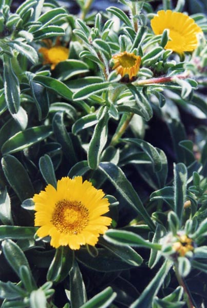 Asteriscus maritimus